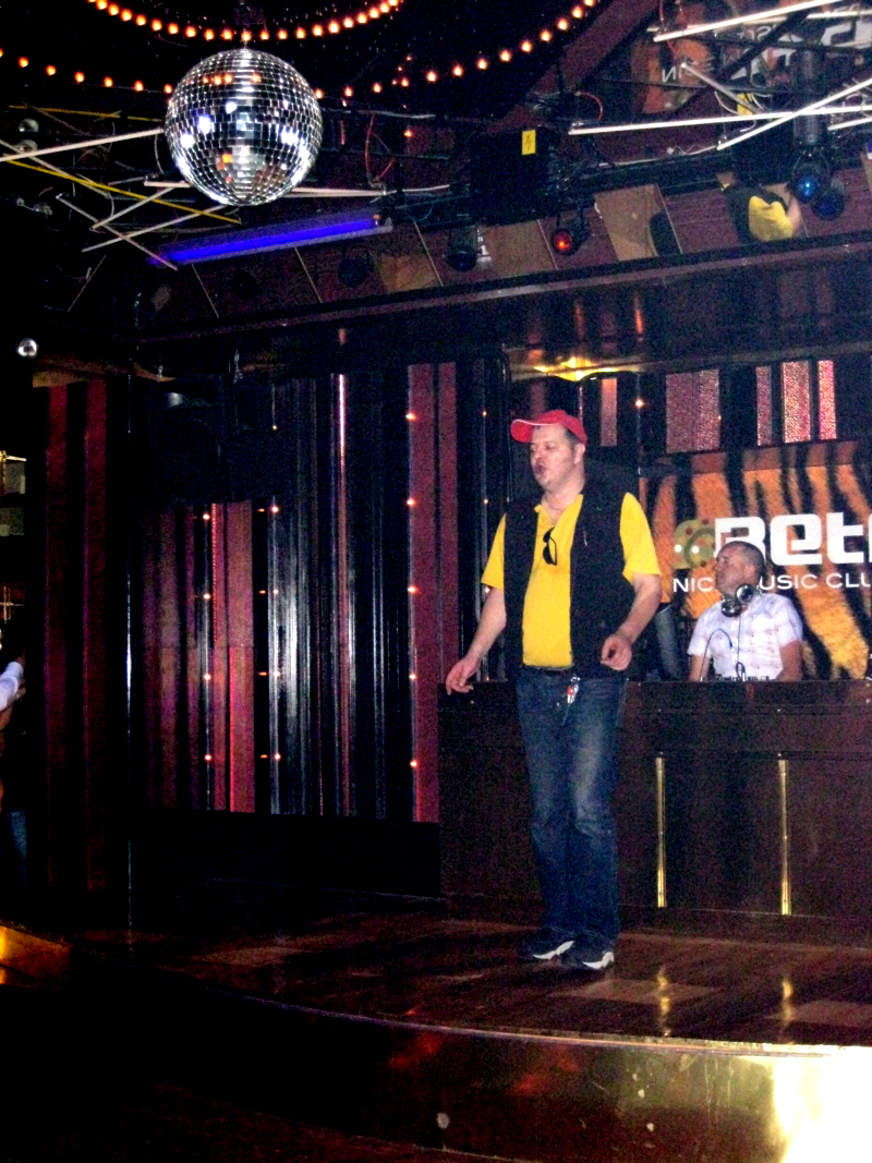 Marijan Ban & Neno Belan, Crikvenica, Croatia